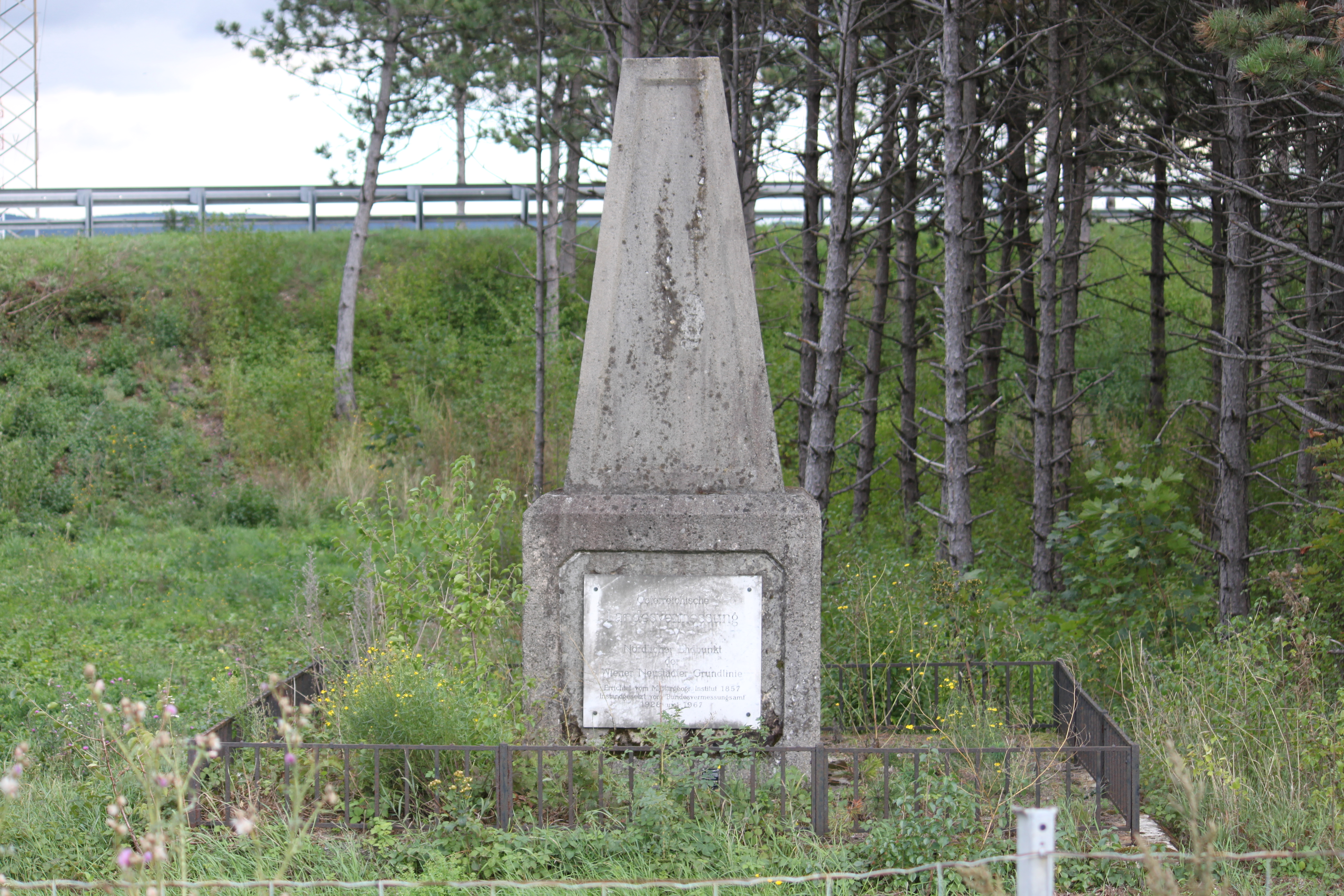 Basis-Endpunkt Nord der Wiener Neustädter Grundlinie, Monolith als Denkmal